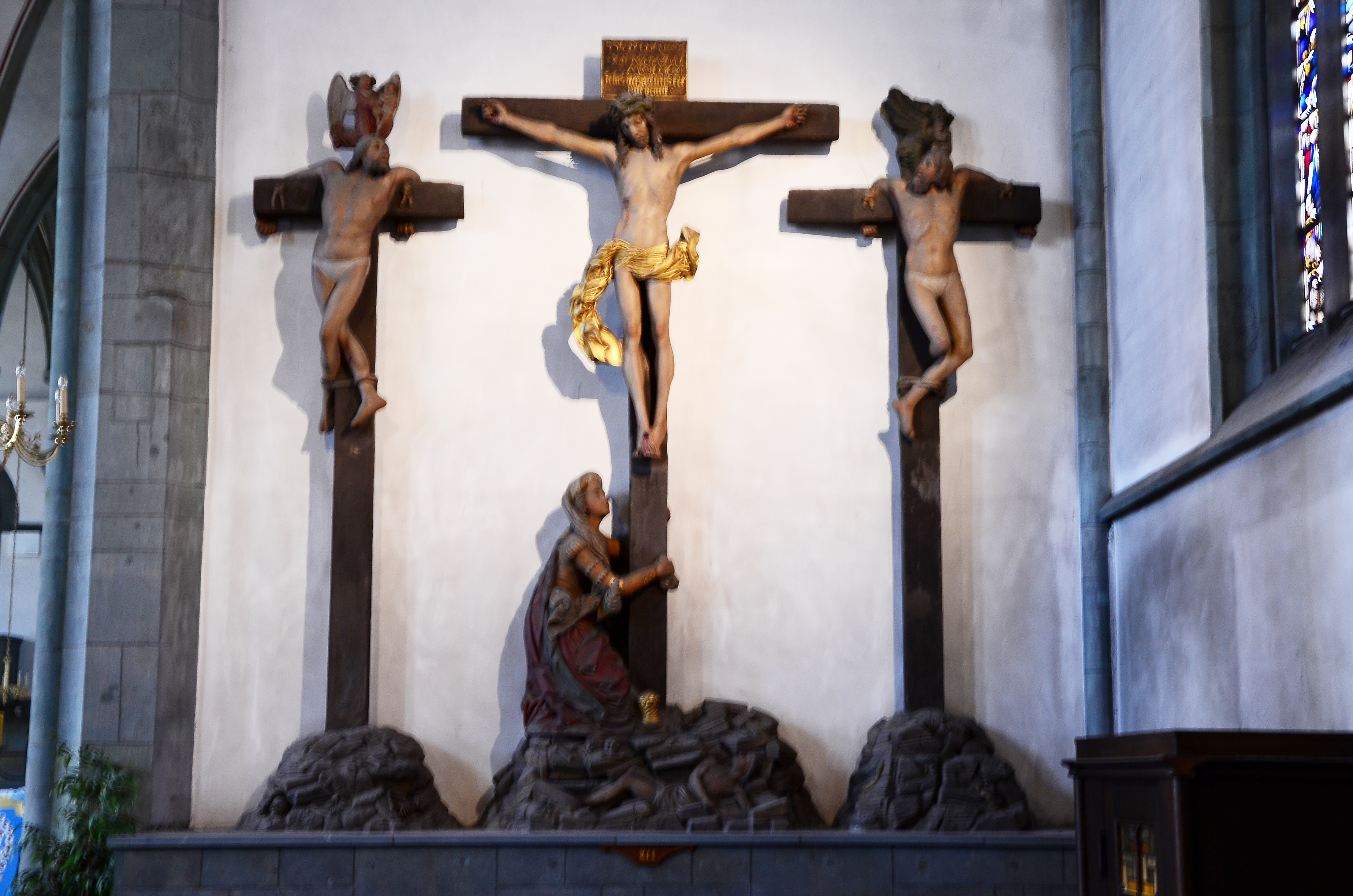 denkmalgeschützte Propsteikirche, Kalvarienbergdarstellung von Evert van Roden, 1515